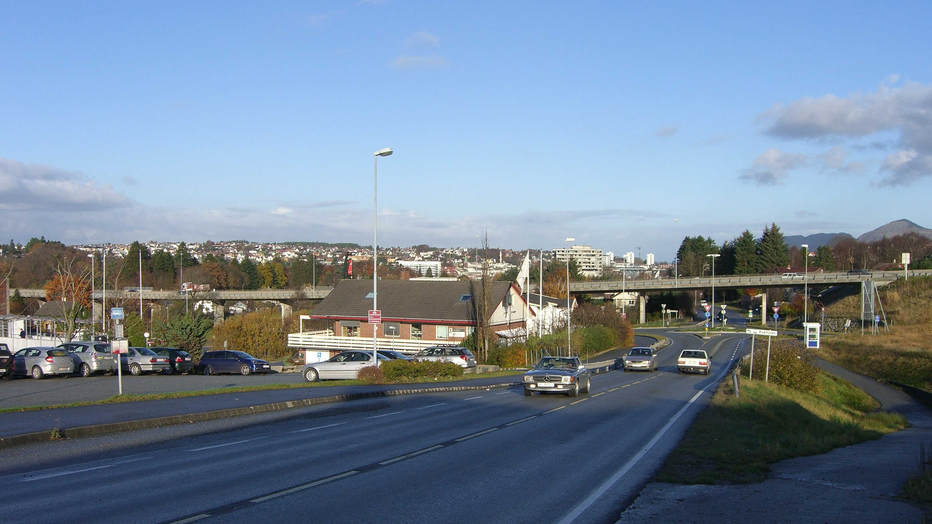 Kvelluren bru in Sandnes, Norway